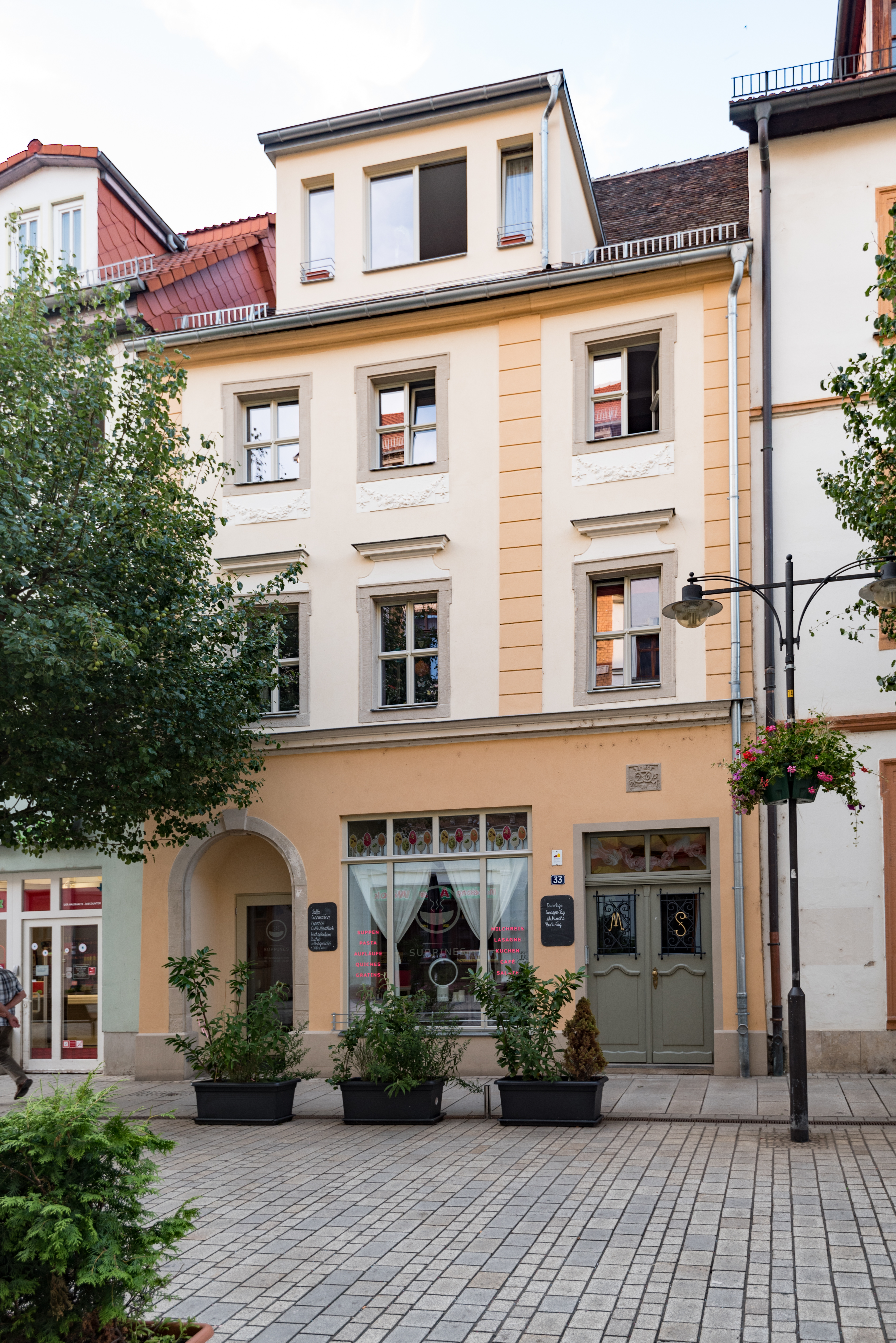 Weißenfels, Jüdenstraße 33